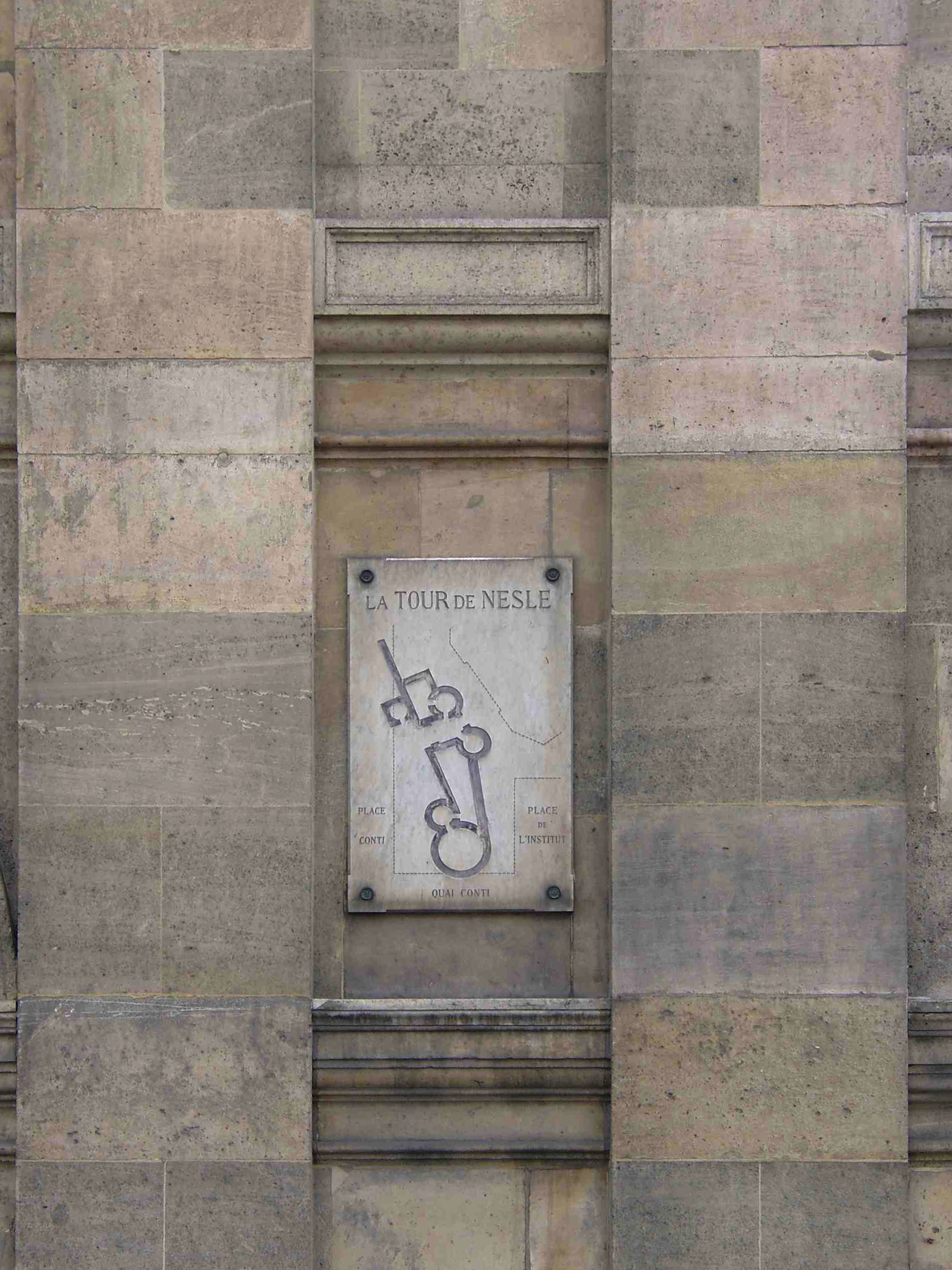 Inscription Tour de Nesle at the Institut de France, Paris